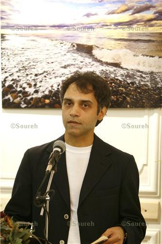 تیرماه ۱۳۸۷ - فرهنگسرای ملل، قیطریه